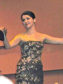 Anna Netrebko bei ihrem Deutschland-Debüt